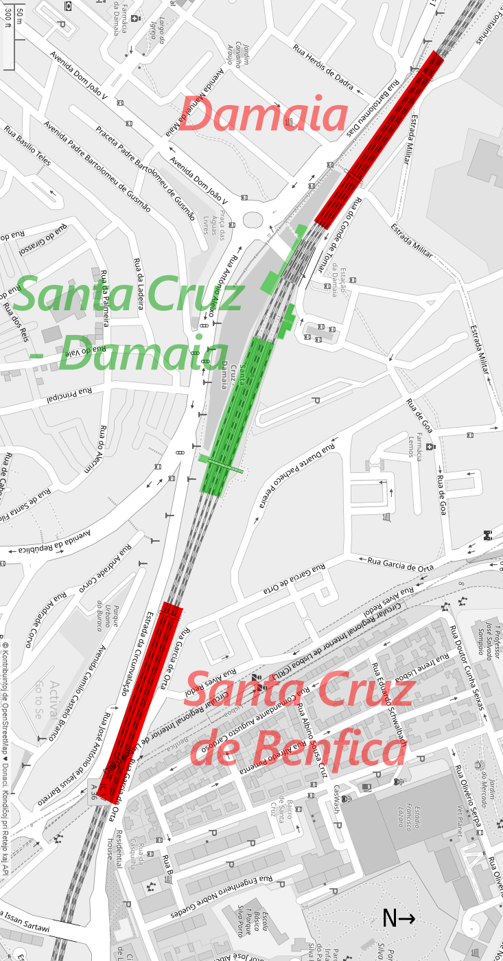 Localização da Estação de Santa Cruz-Damaia em relação aos apeadeiros de Santa Cruz de Benfica e da Damaia, que substituiu. This map may be incomplete, and may contain errors. Don't rely solely on it for navigation.